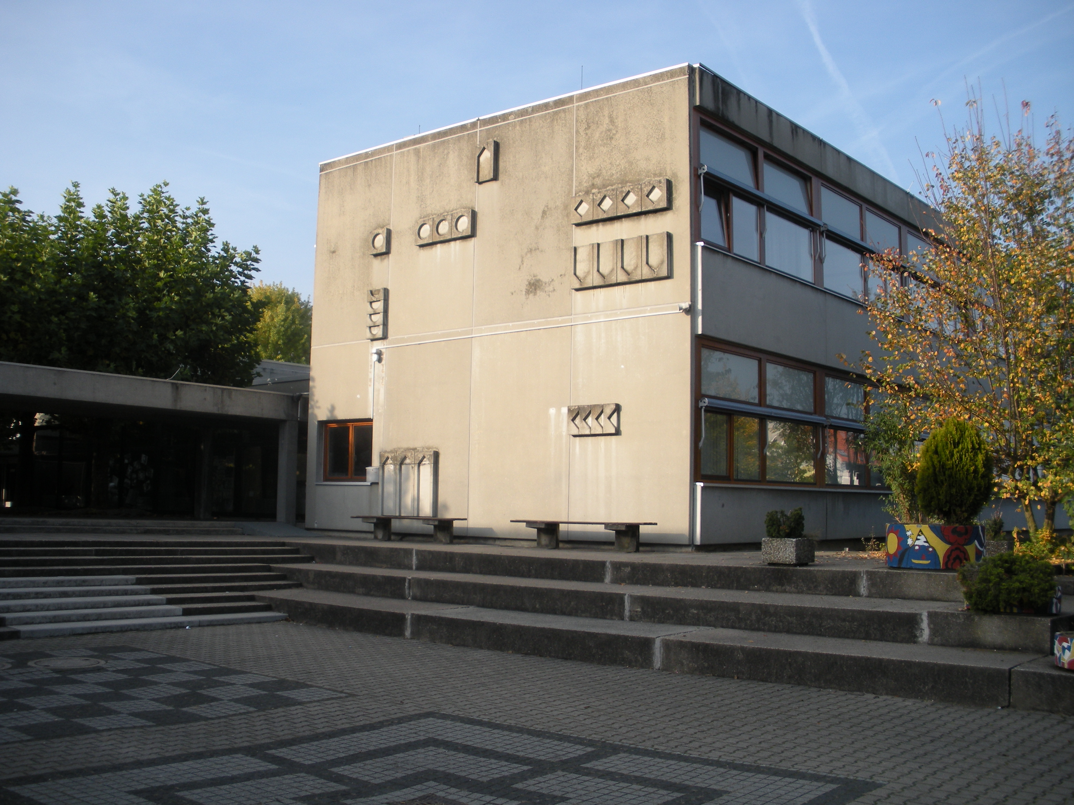 Eisenhutschule Unteröwisheim in Kraichtal